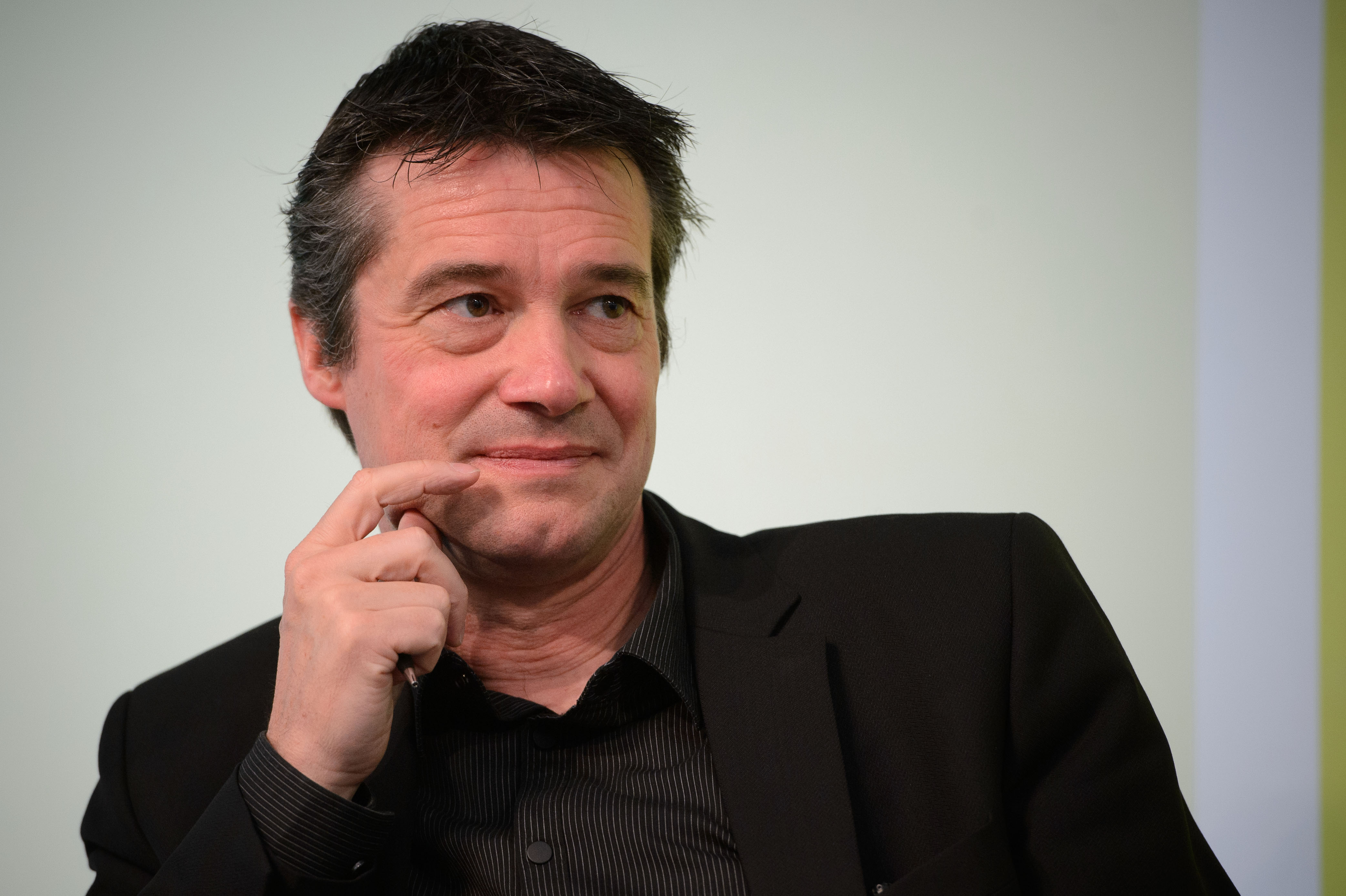 Rainer Forst bei einer Diskussion der Heinrich-Boell-Stiftung